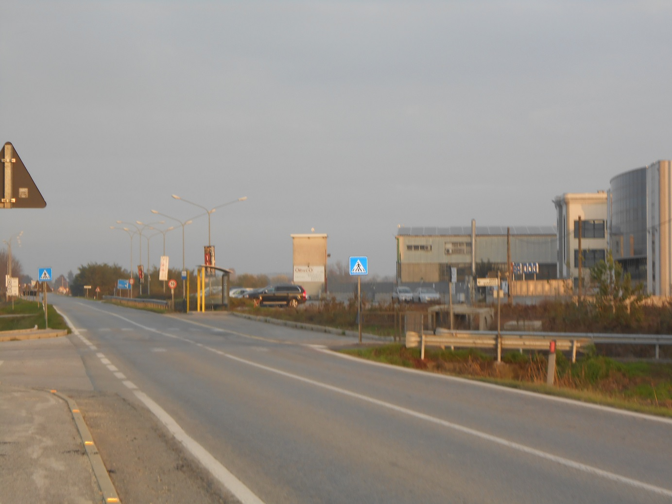 Piemontèis: Zona Industrial ed Faule